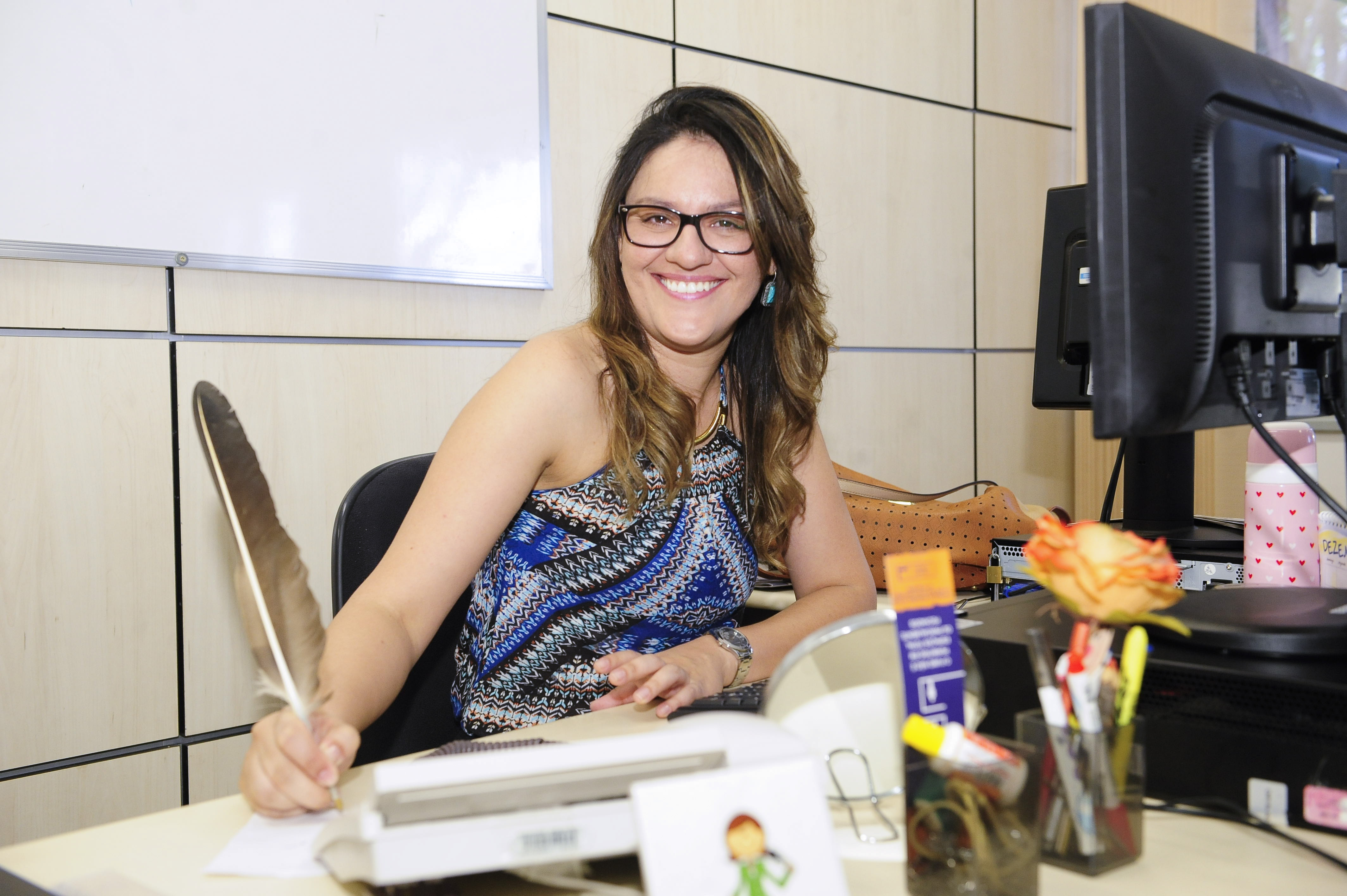 Central de Pautas - Gerencia e alimenta o sistema de informações sobre as atividades do Senado que terão cobertura jornalística dos veículos da Casa, promove reuniões de pauta para organizar a cobertura, coordena a produção de textos de apoio aos repórteres, encaminha à equipe de Tecnologia da Informação as atualizações e mudanças do sistema de pautas. Aline Guedes Foto: Waldemir Barreto/Agência Senado